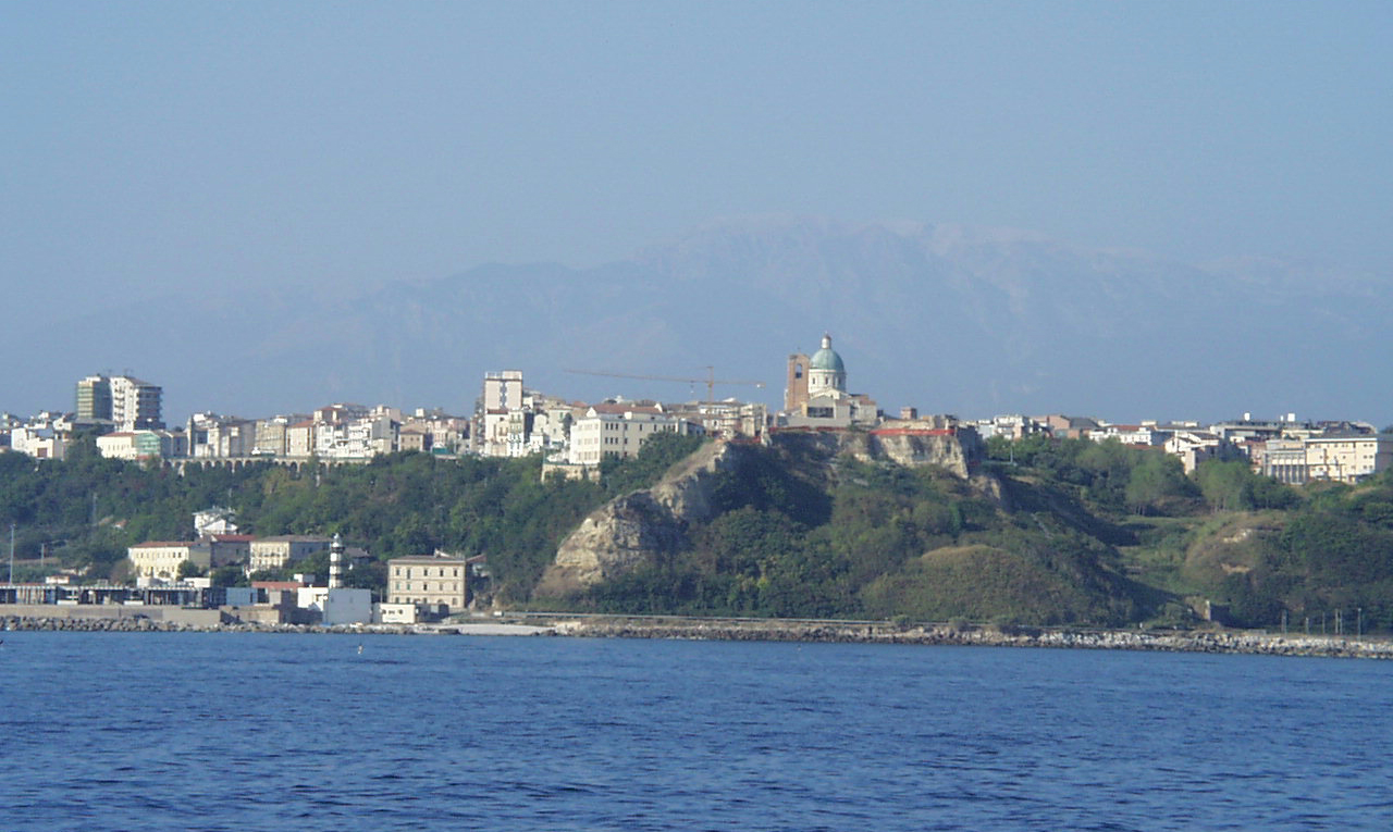 Ortona von der Seeseite